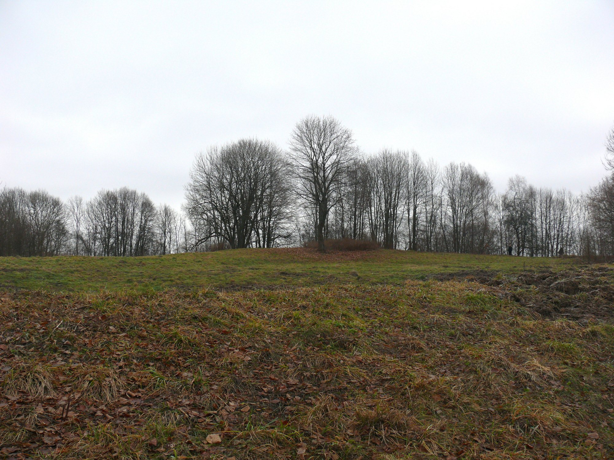 Bražuolės piliakalnio aikštelė